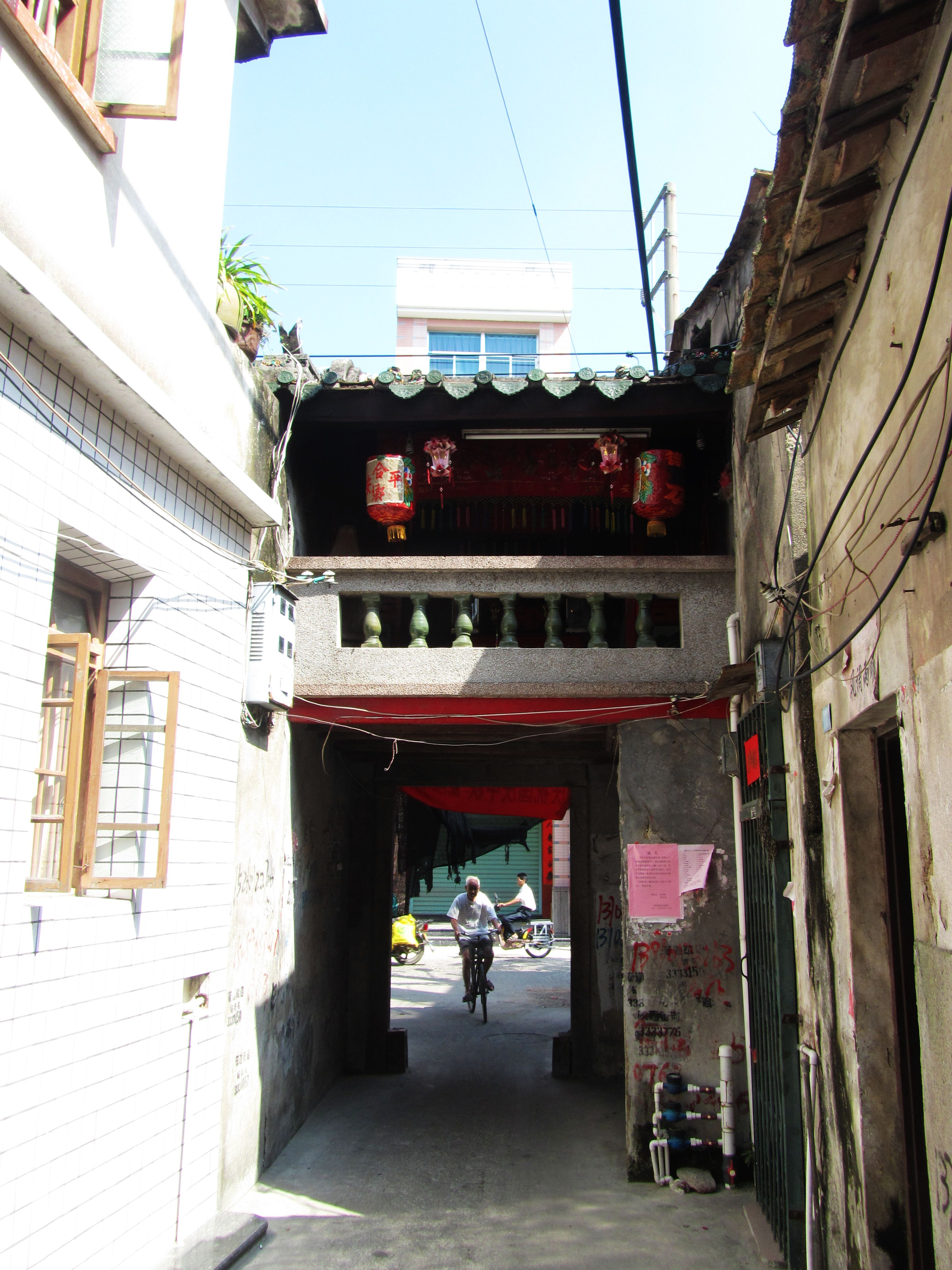 位于福建省漳州市诏安县中山东路巷内的一座过街楼。